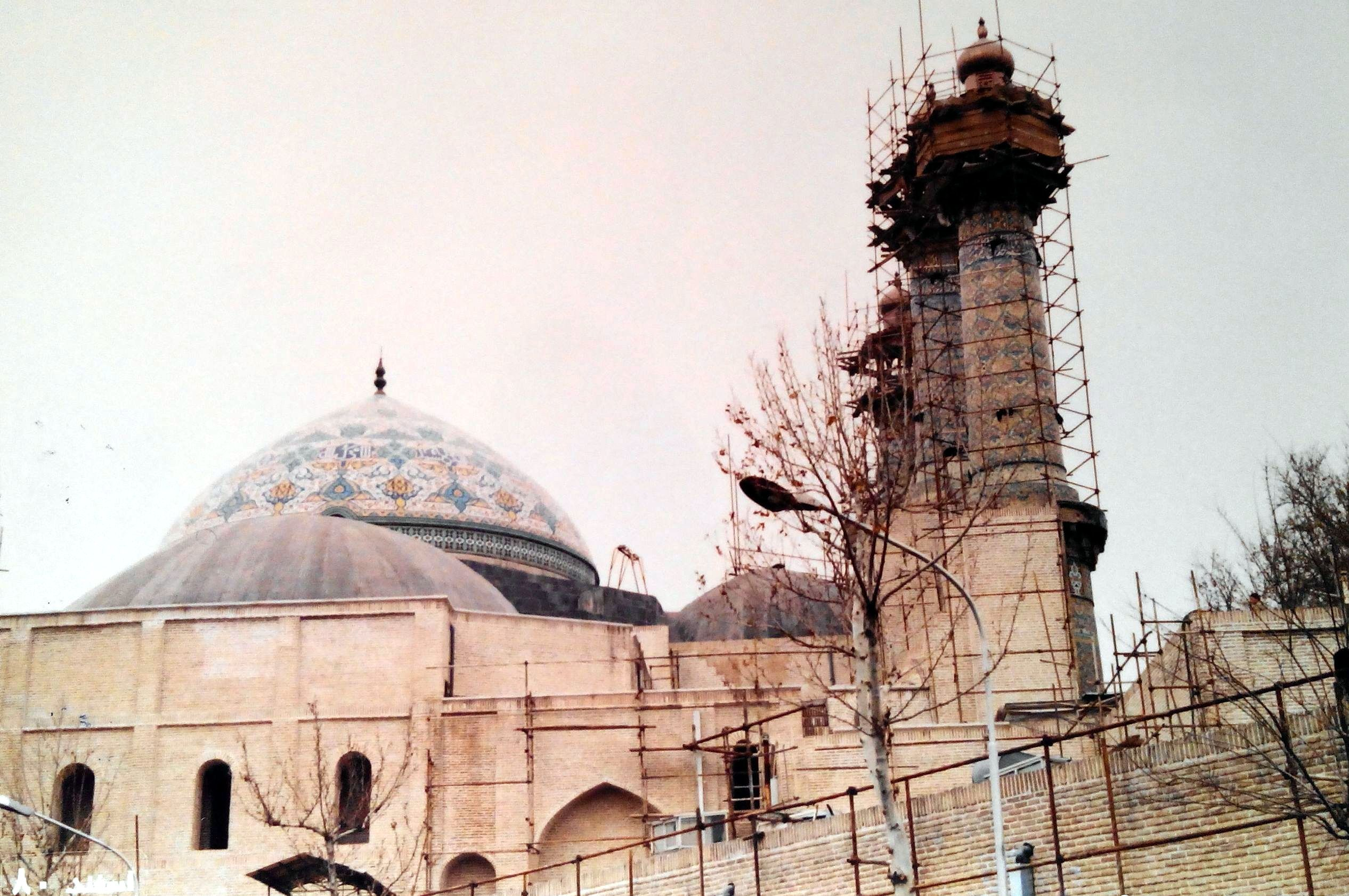 مسجد سپه‌سالار خیابان علامه شریف رضی تهران ایران